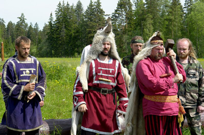 Ход славянского жречества. Схорон еж Славен. Богумил Второй.